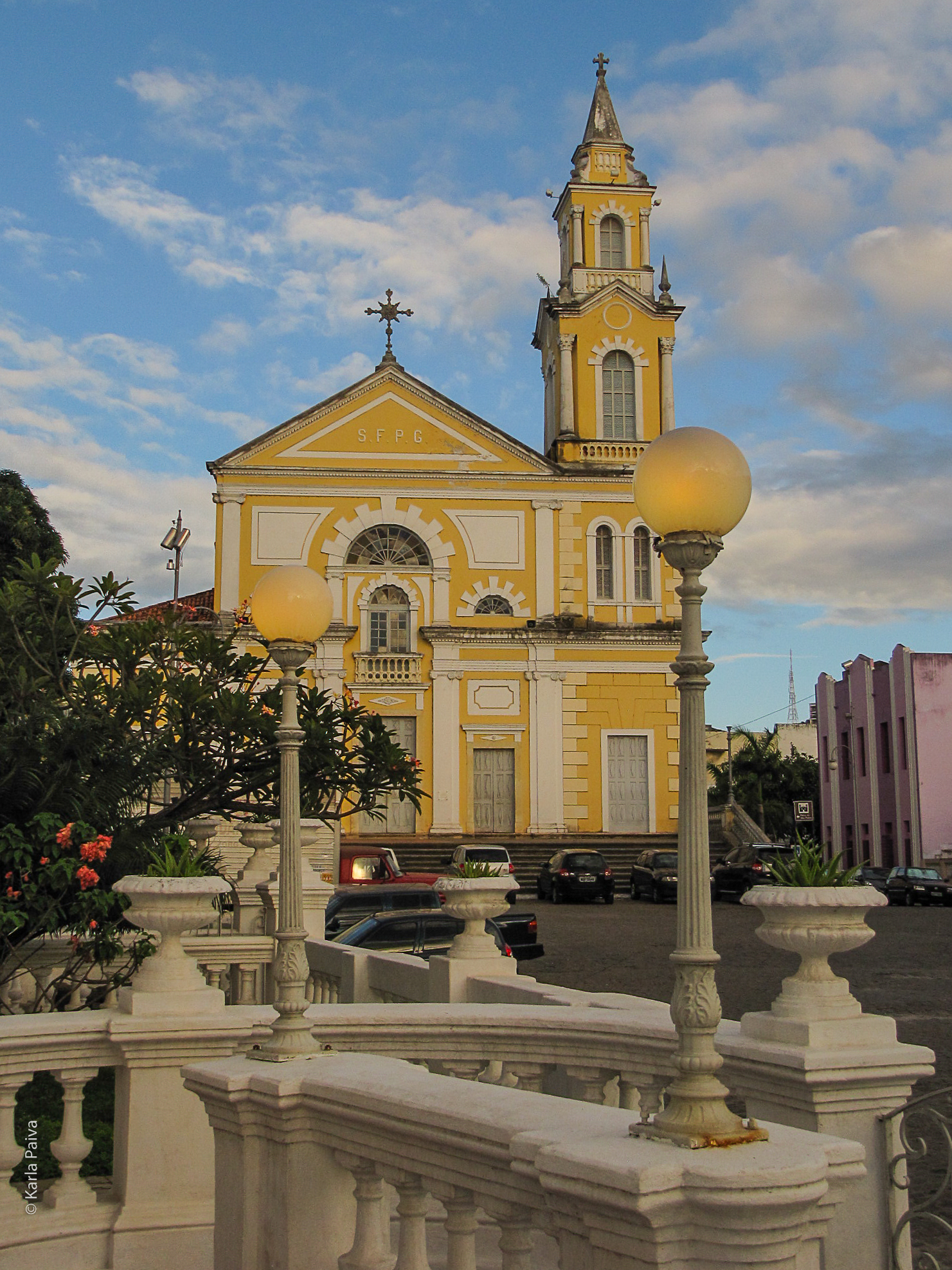 Centro Histórico de João Pessoa